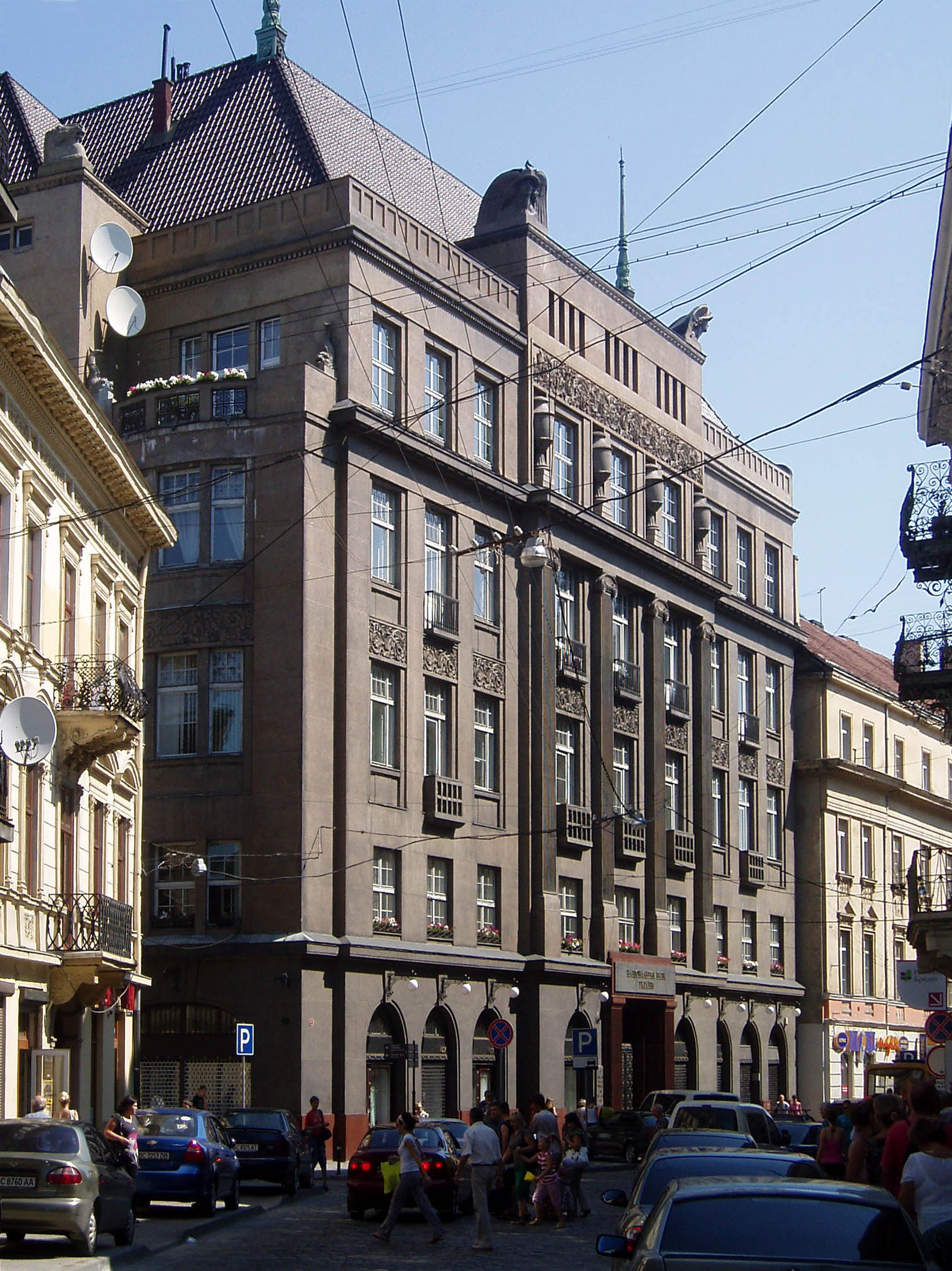 Будинок № 4 на вулиці Коперника у Львові. Архітектори Альфред Захаревич (1871-1937) і Юзеф Сосновський (1865-1918). Належить Національному банку України.